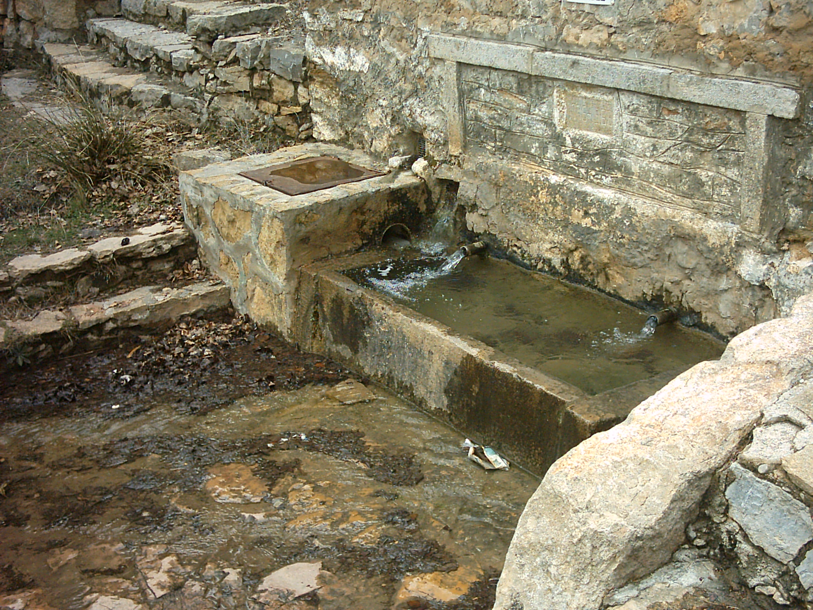 Ermita de Santa Anna (Sucaina) 08.142-003.